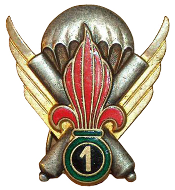 insigne de la 1ère CEPML